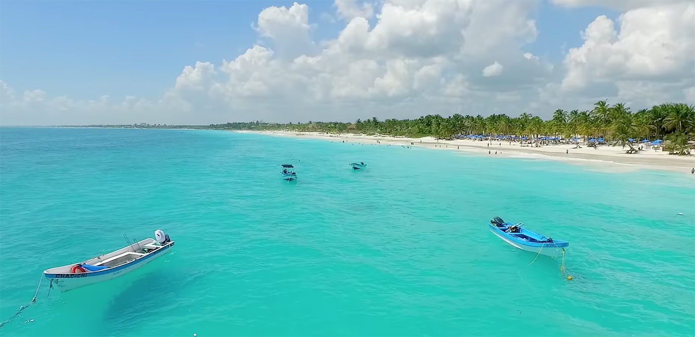 Esta es una de las playas de Tulum, en México. Un paraíso de la Riviera Maya y uno de los mejores lugares del Caribe Mexicano junto con Cancún & Playa del Carmen. Foto de YouTube.